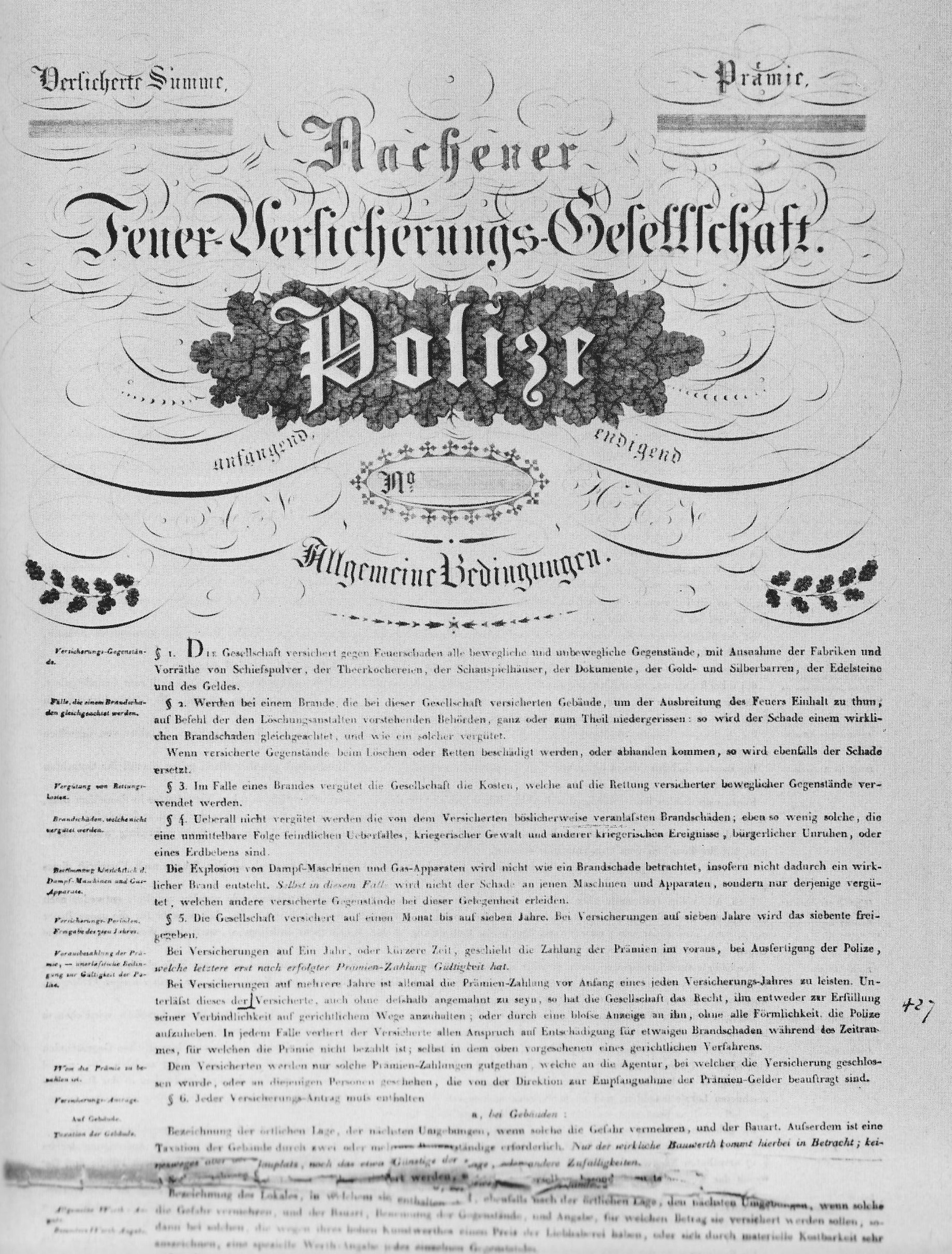 „Das erste Policen-Formular der Aachener Feuer-Versicherungs-Gesellschaft von 1825, gestochen von der Schulgen-Bettendorffschen Kupferdruckerei in Bonn. Akten der Regierung Aachen (Hauptstaatarchiv Düsseldorf, Nebenstelle Schloß Kalkum).“ – Poll, s.u.